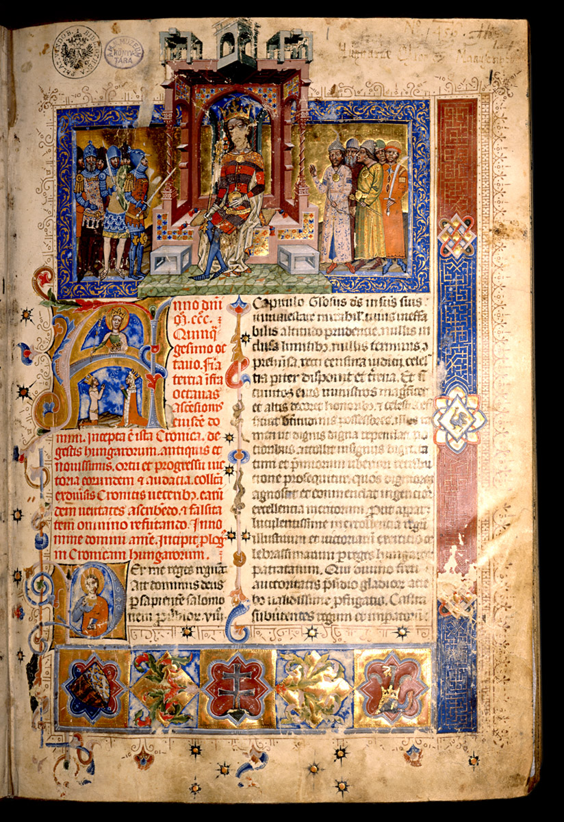 A Képes krónika első lapja